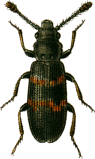 This file has been extracted from another file: Jacobs19.jpg